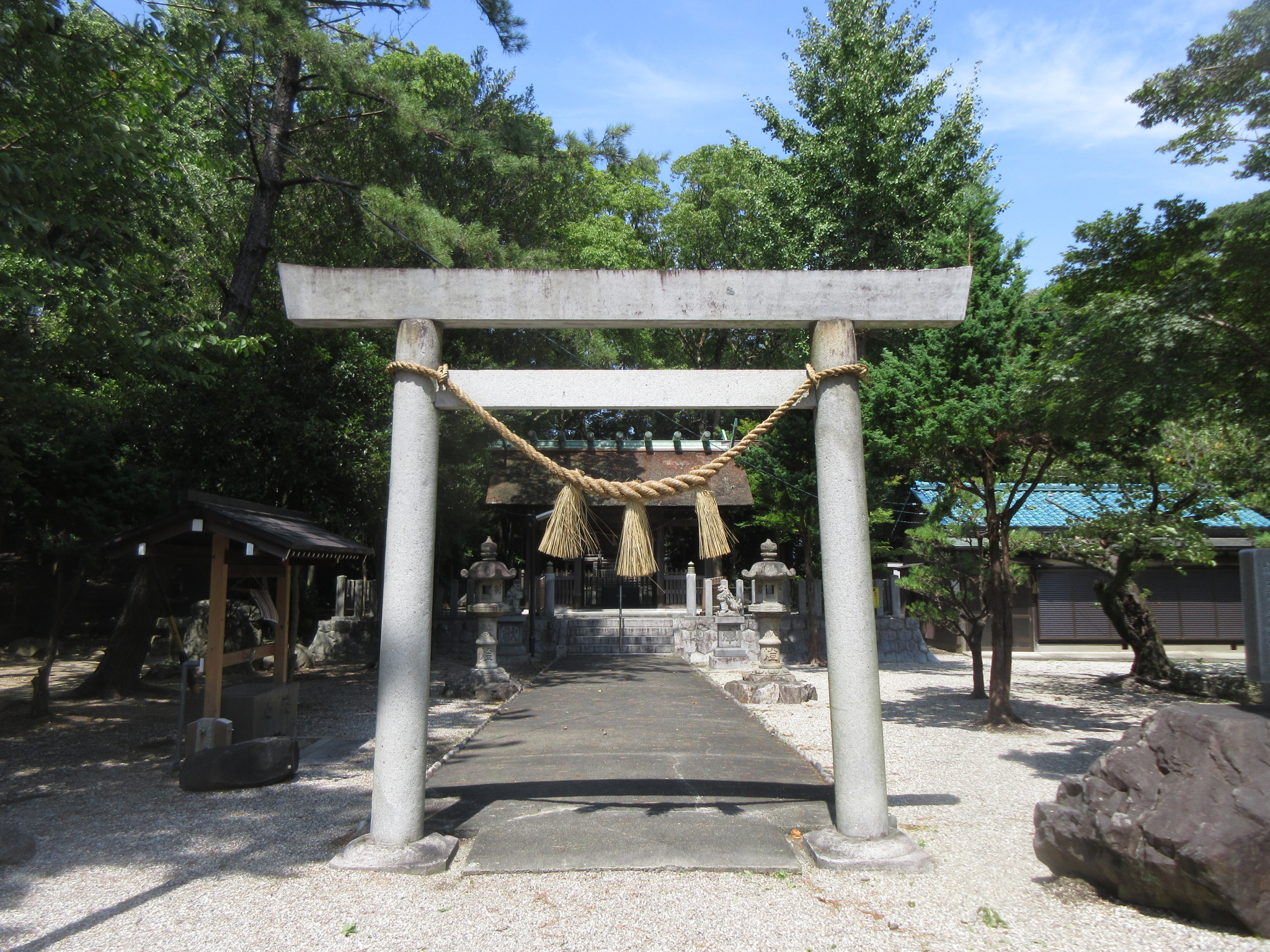 西尾歴史公園内にある西尾神社